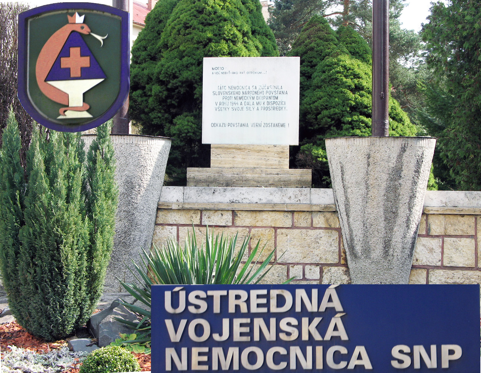 Pamätná tabuľa v objekte Ústrednej vojenskej nemocnice v Ružomberku